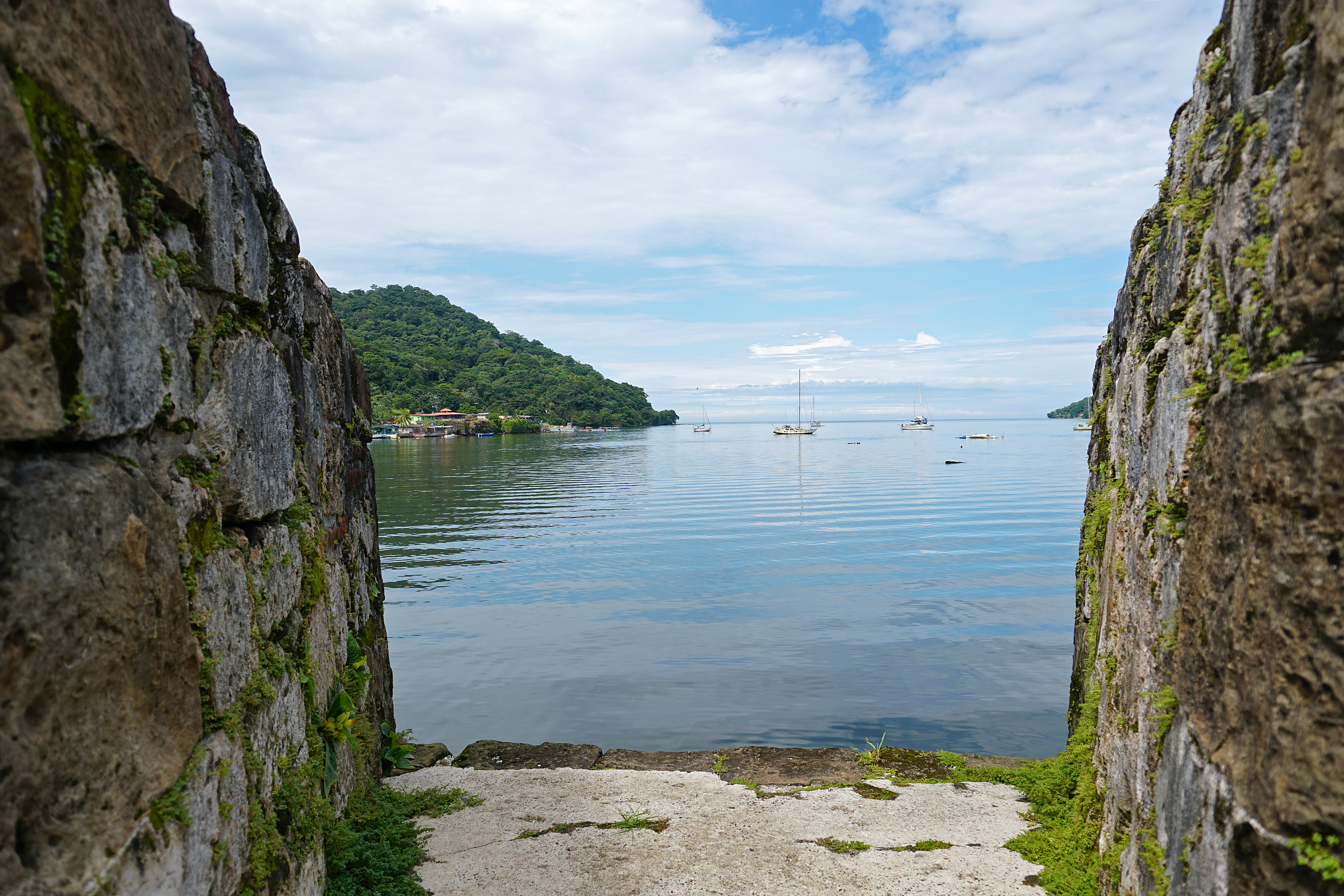 Ruinas del Castillo San Jerónimo, Portobelo, Panamá